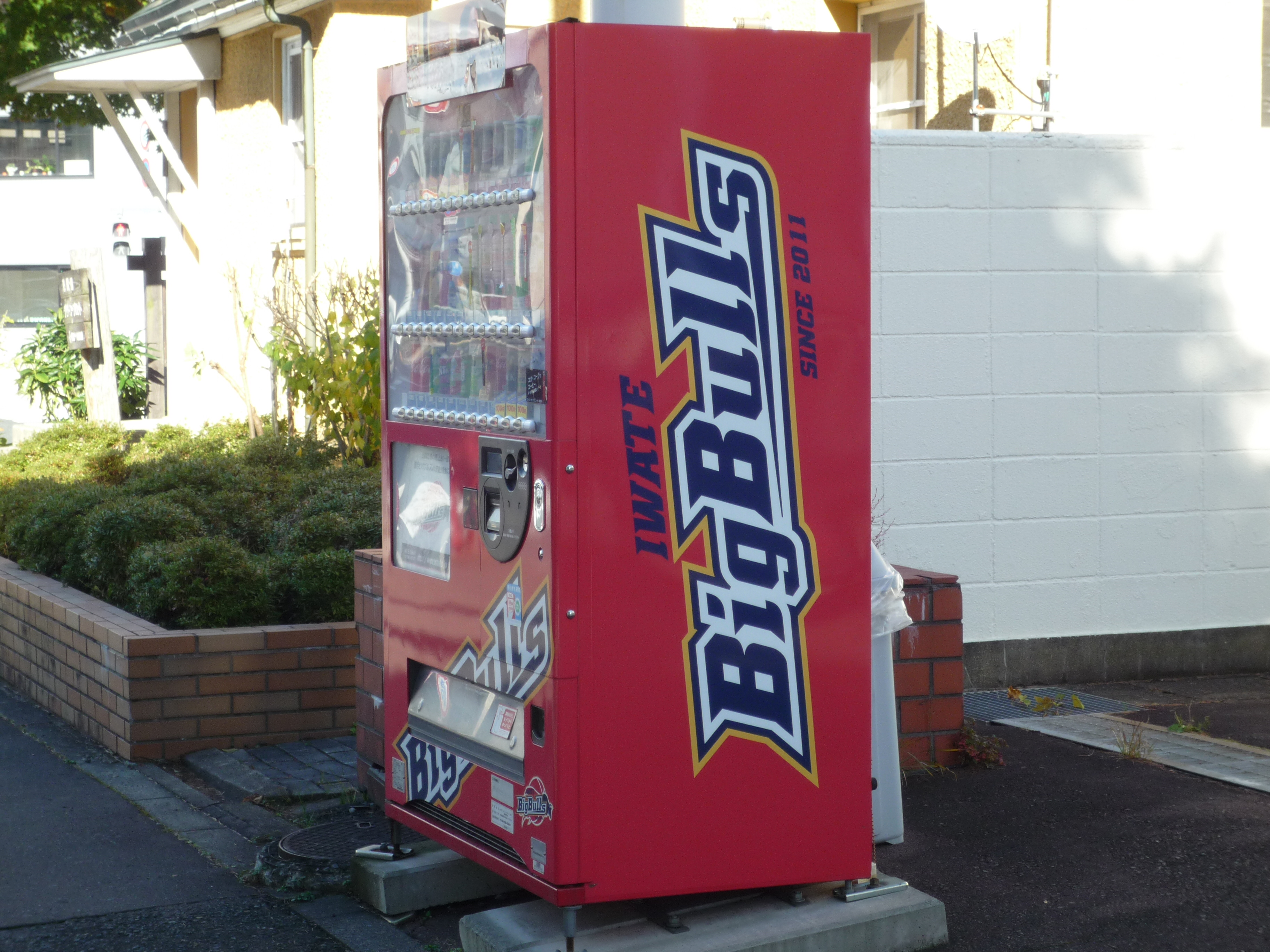 岩手ビッグブルズの関連会社の前には、このようにロゴマークのついた自動販売機が設置されている。画像は盛岡情報ビジネス専門学校の前に設置されているもの。